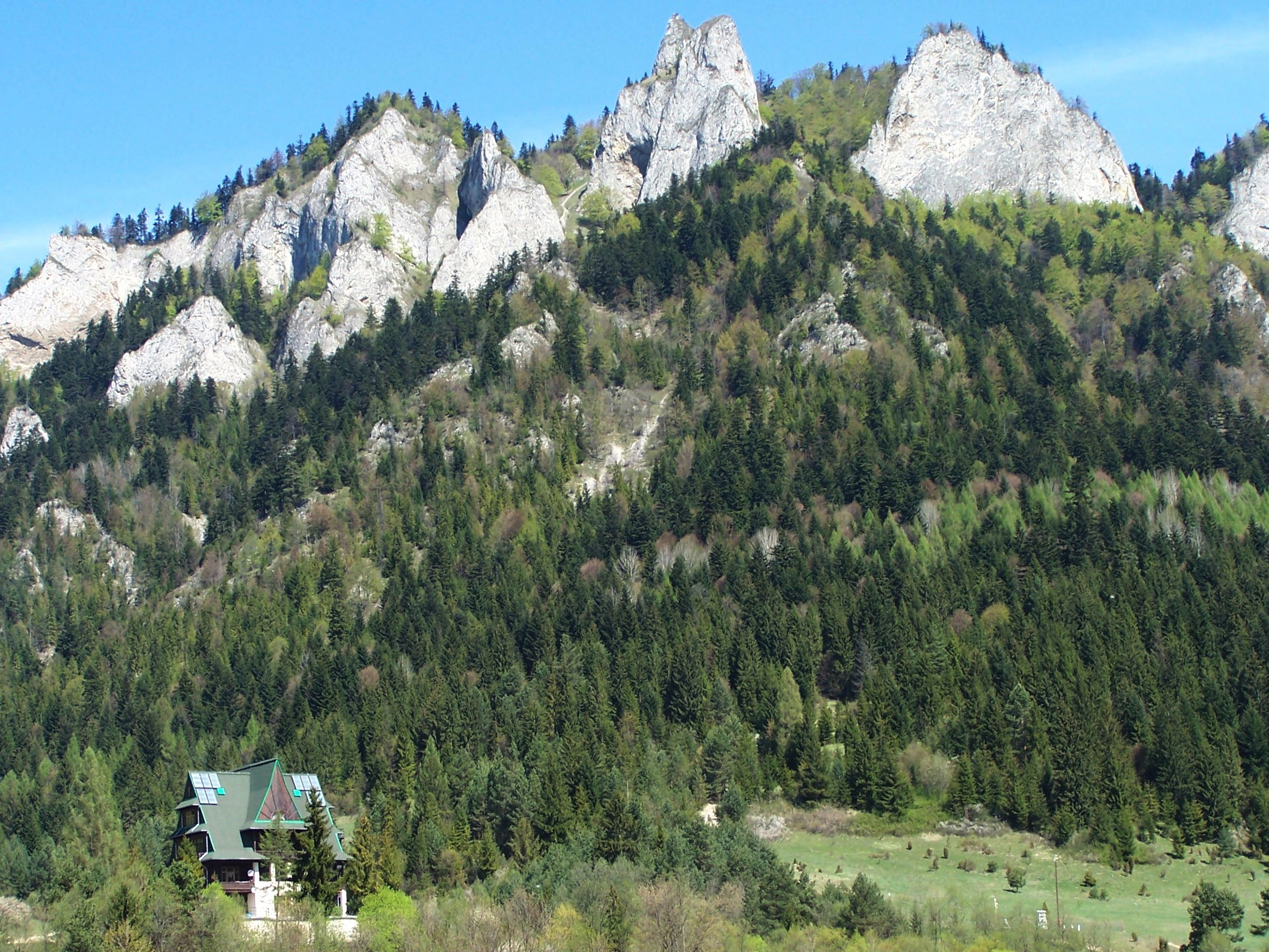 Trzy Korony (Pieniny)